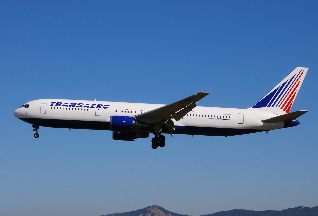 Photo prise à l'aéroport de Barcelone-El Prat (LEBL) en Espagne. Picture take at Barcelona-El Prat Airport (LEBL) in Spain.